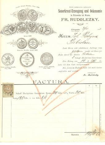 Faktura der Erste mährische prämiirte Sauerkraut-Erzeugung und Oekonomie in Priesenitz bei Brünn Fr. Rudolezky